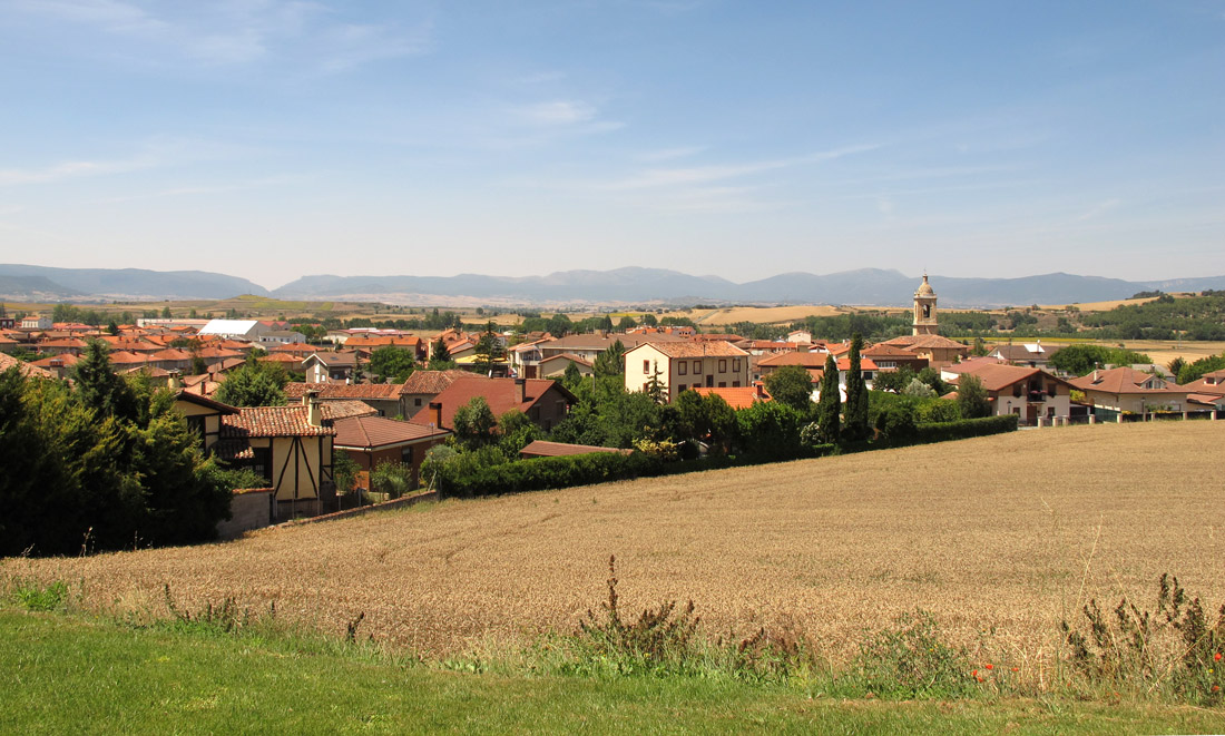 Vista del pueblo de Rivabellosa (Álava), desde su ermita de San Juan y de la Magdalena.